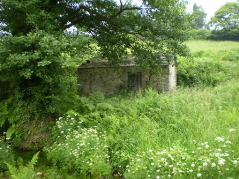 O Muíño de Villarquide en Xove.